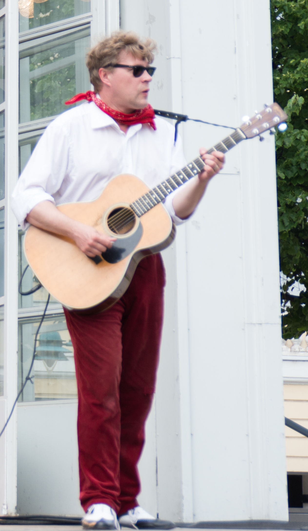 Stefanos Hirvonen suomalainen kitaristi